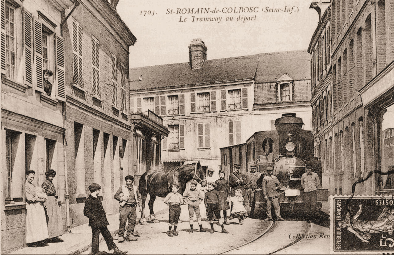 Le tramway de Saint-Romain-de-Colbosc devant la gare de Saint-Romain-ville. Locomotive n°1 (Corpet Louvet n°680 de 1897)